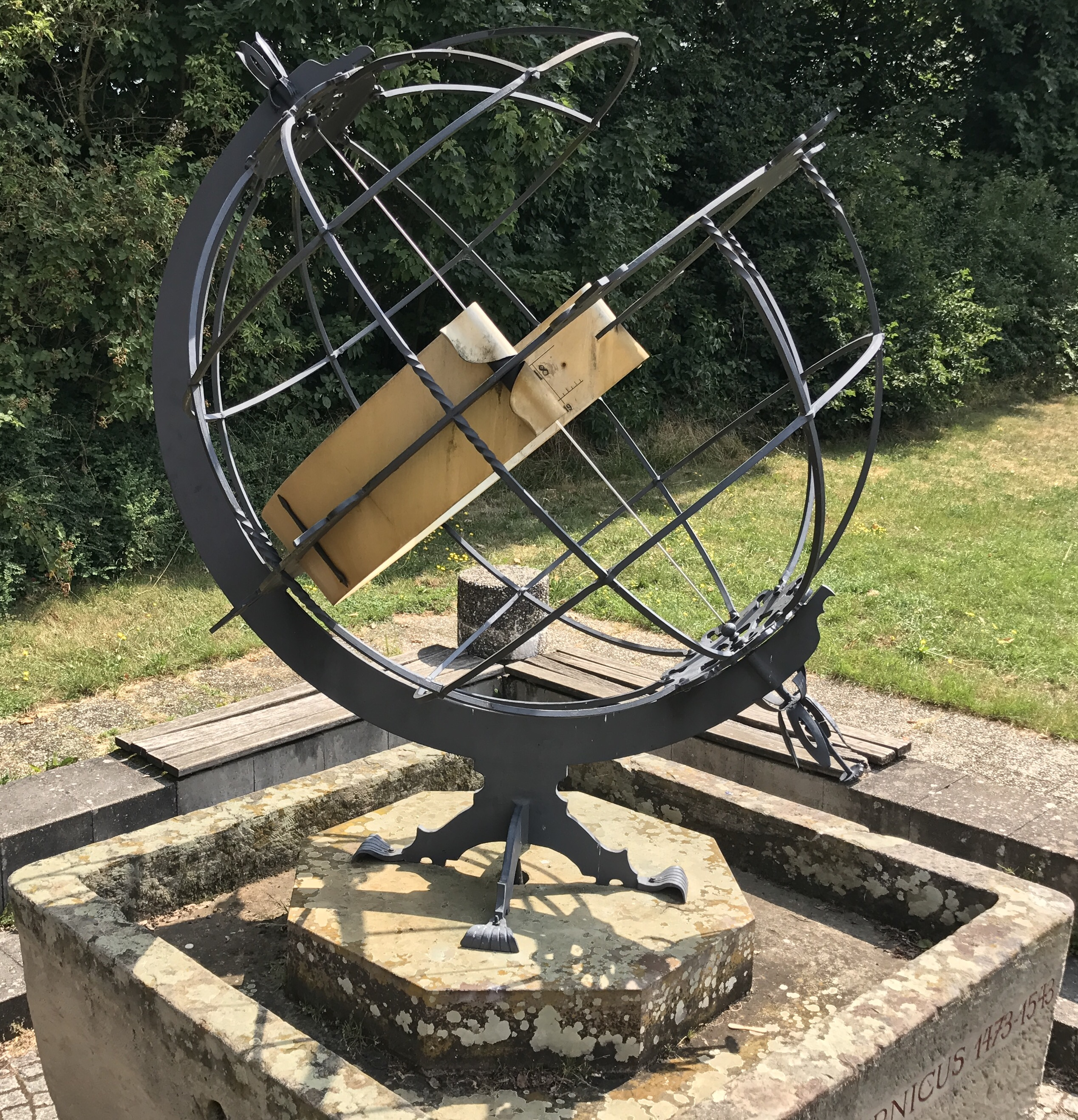 Das Wahrzeichen der Schule.